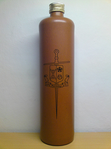 Fles Grutte Pier Beerenburg